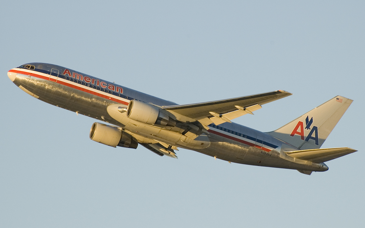 departing LAX